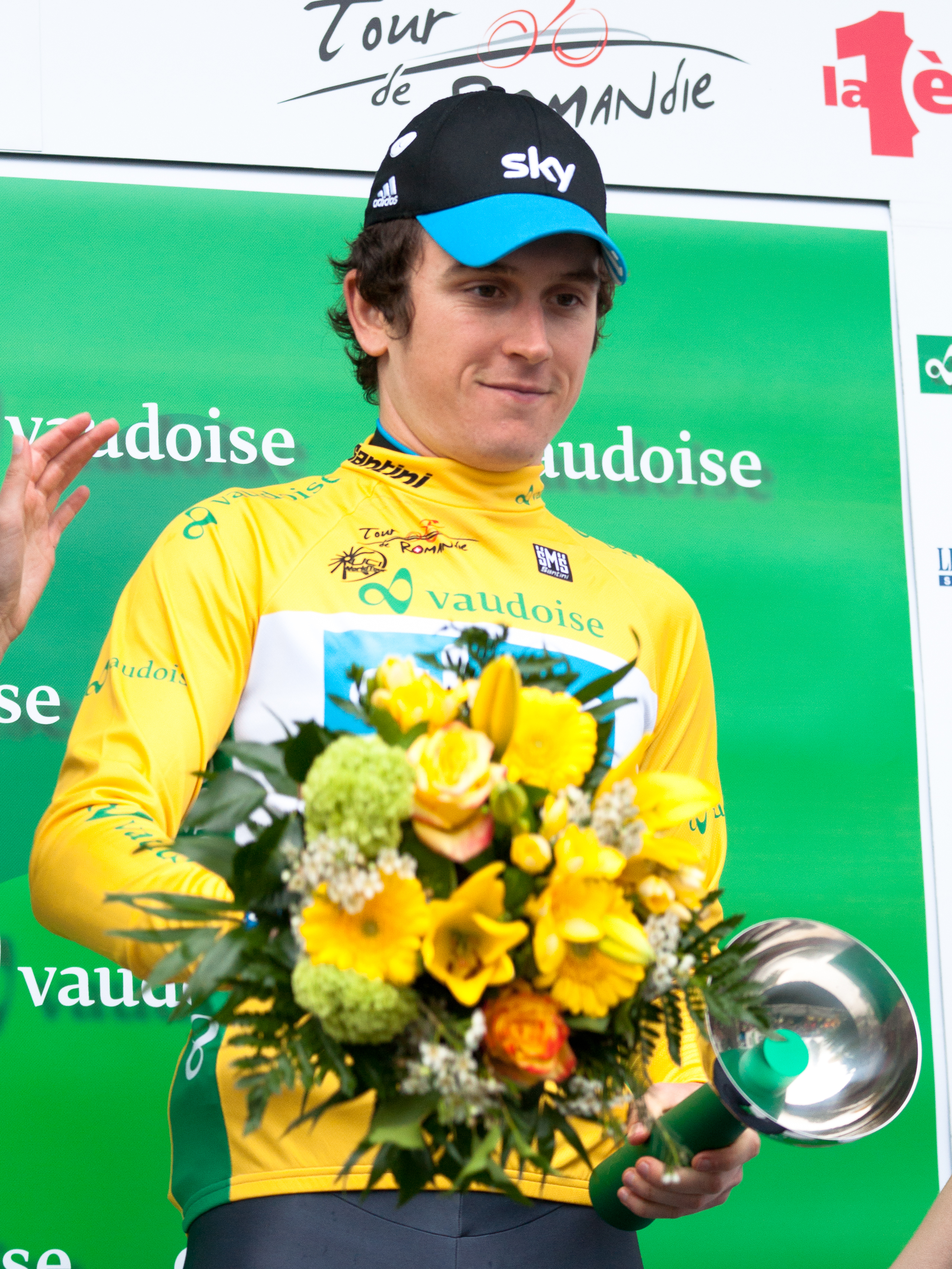 Geraint Thomas sur le podium du prologue du Tour de Romandie 2012